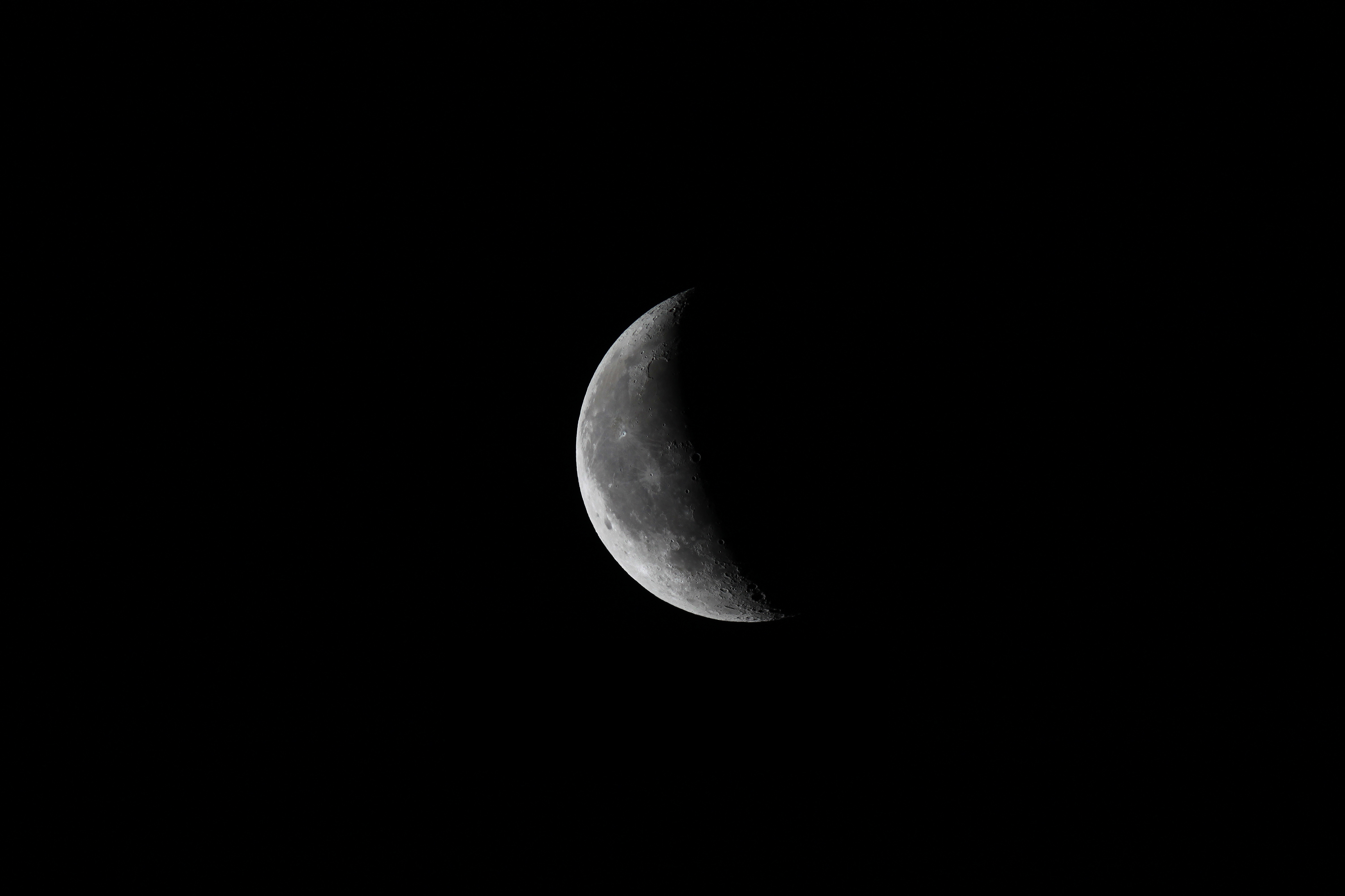 Photo de la lune prise à Iwuy (France, Nord) auteur:Jérôme Salez